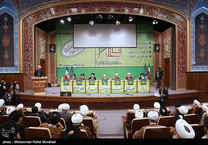 Hawza Qom Lecturers Annual Assembly - 2016